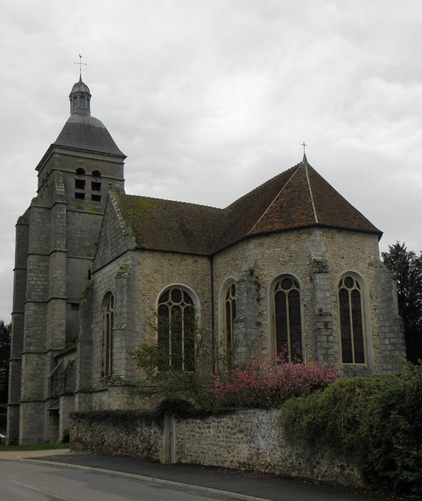 Église Saint-Sulpice de Faremoutiers (77).